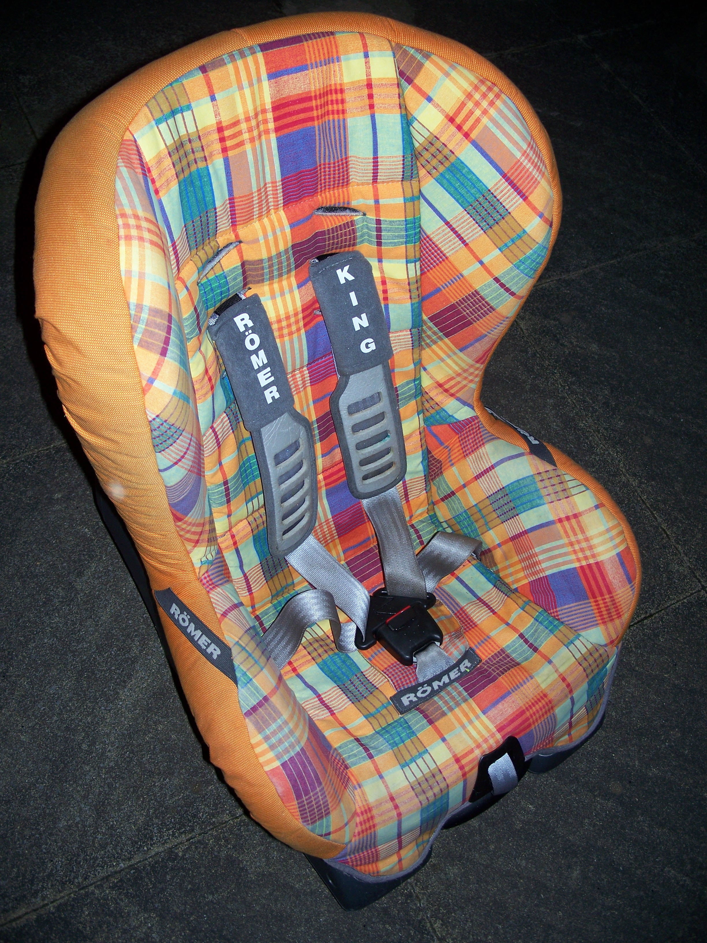 Kindersitz BxHxT 47x61x52cm / Child Car Seat